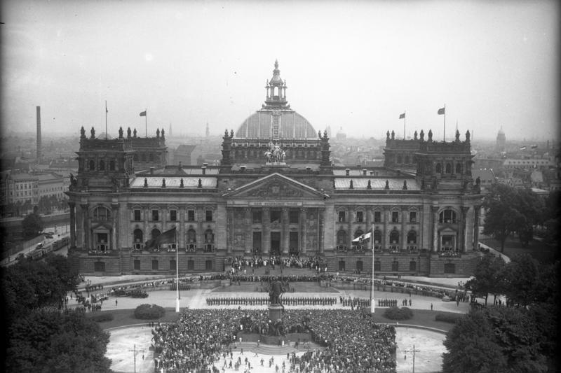 Die grosse Verfassungsfeier der Reichsregierung am 11. August 1932 in Berlin ! Blick von der Siegessäule auf den flaggengeschmückten Platz vor dem Reichstag während der Verfassungsfeier.